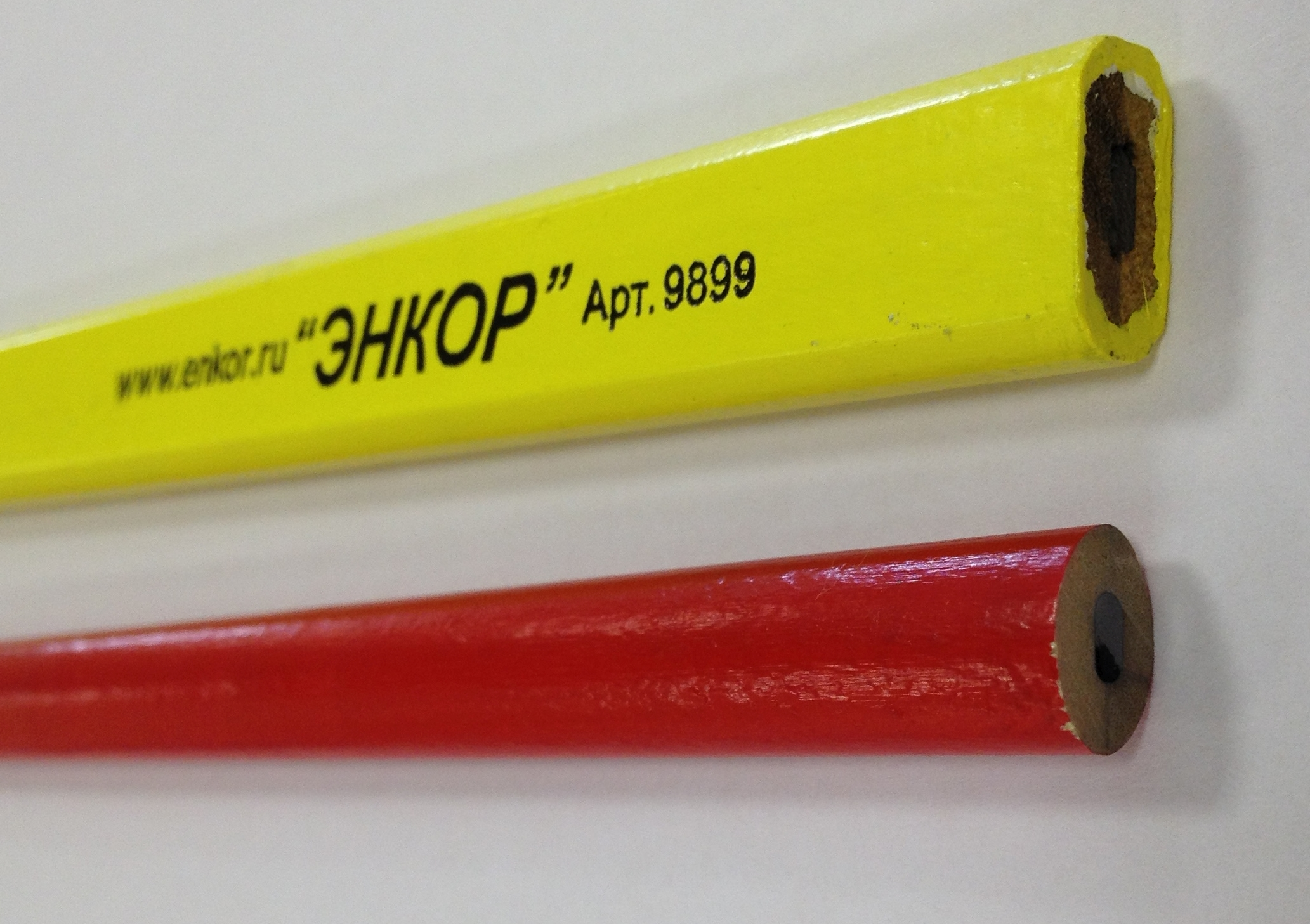 Строительные карандаши